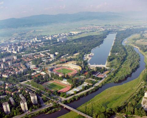 Гребната база от високо